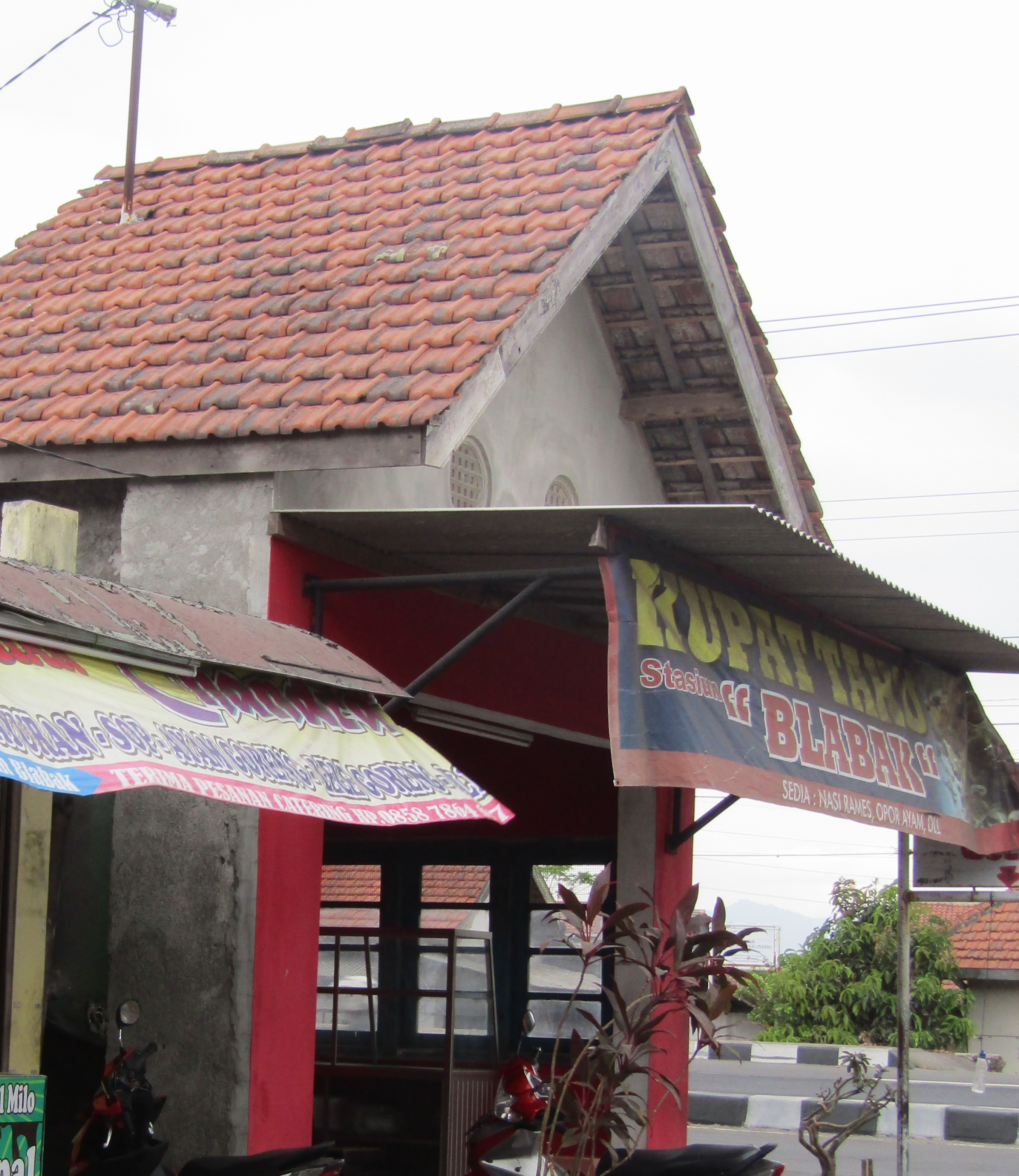 Stasiun Blabak tahun 2018, berubah menjadi warung makan